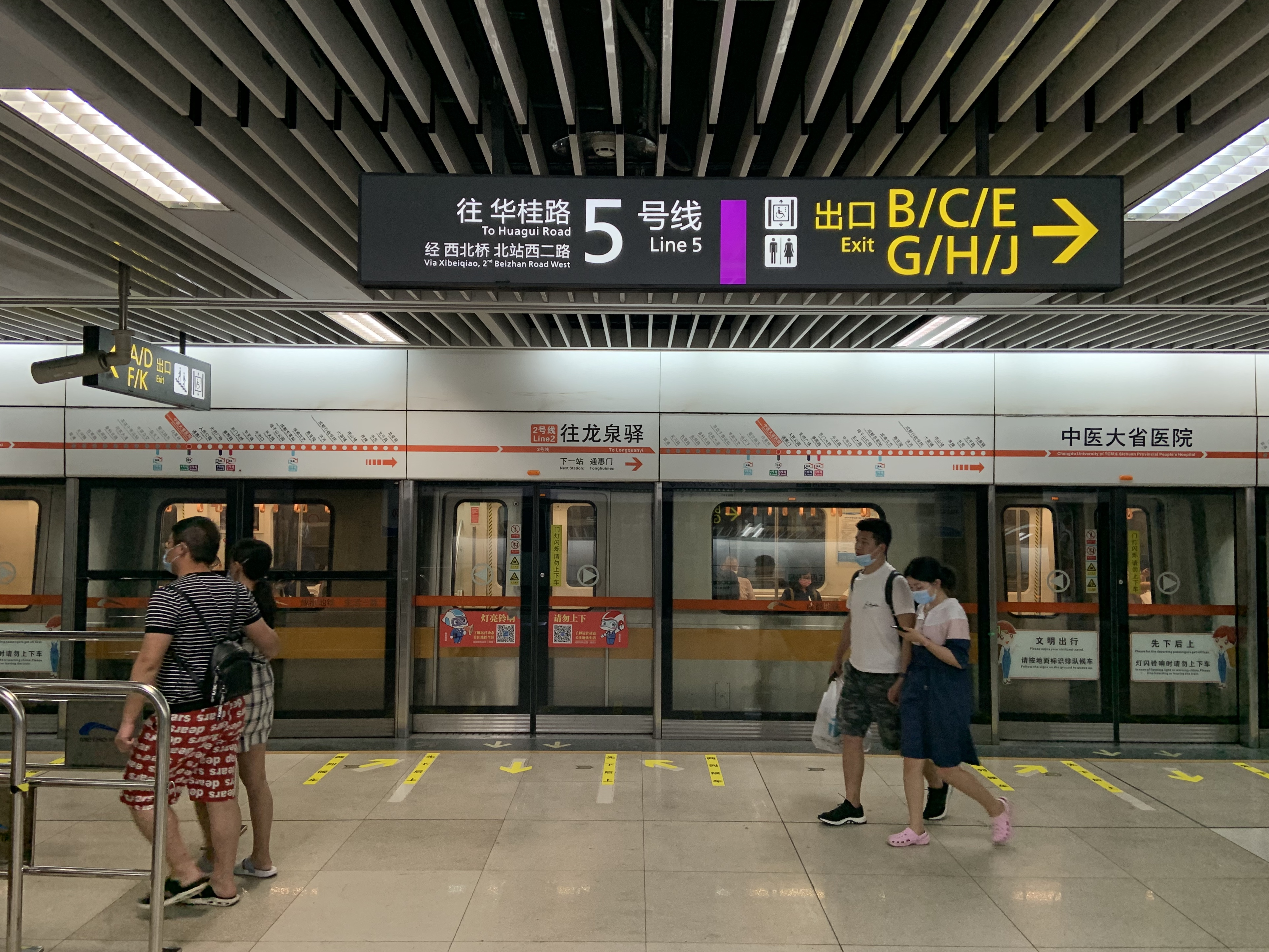 成都地铁新导向设计